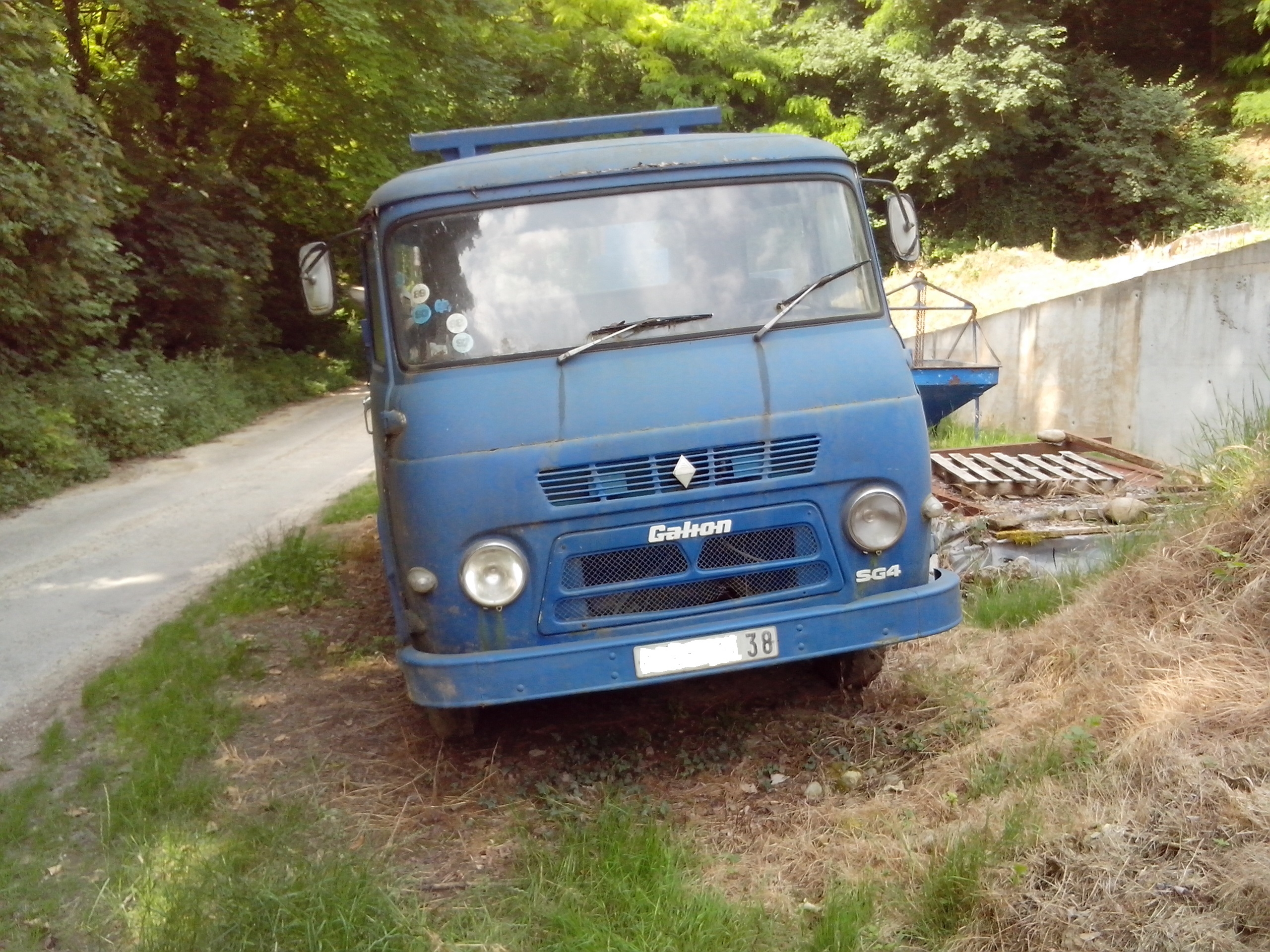 SG 4 super galion avec cabine première génération